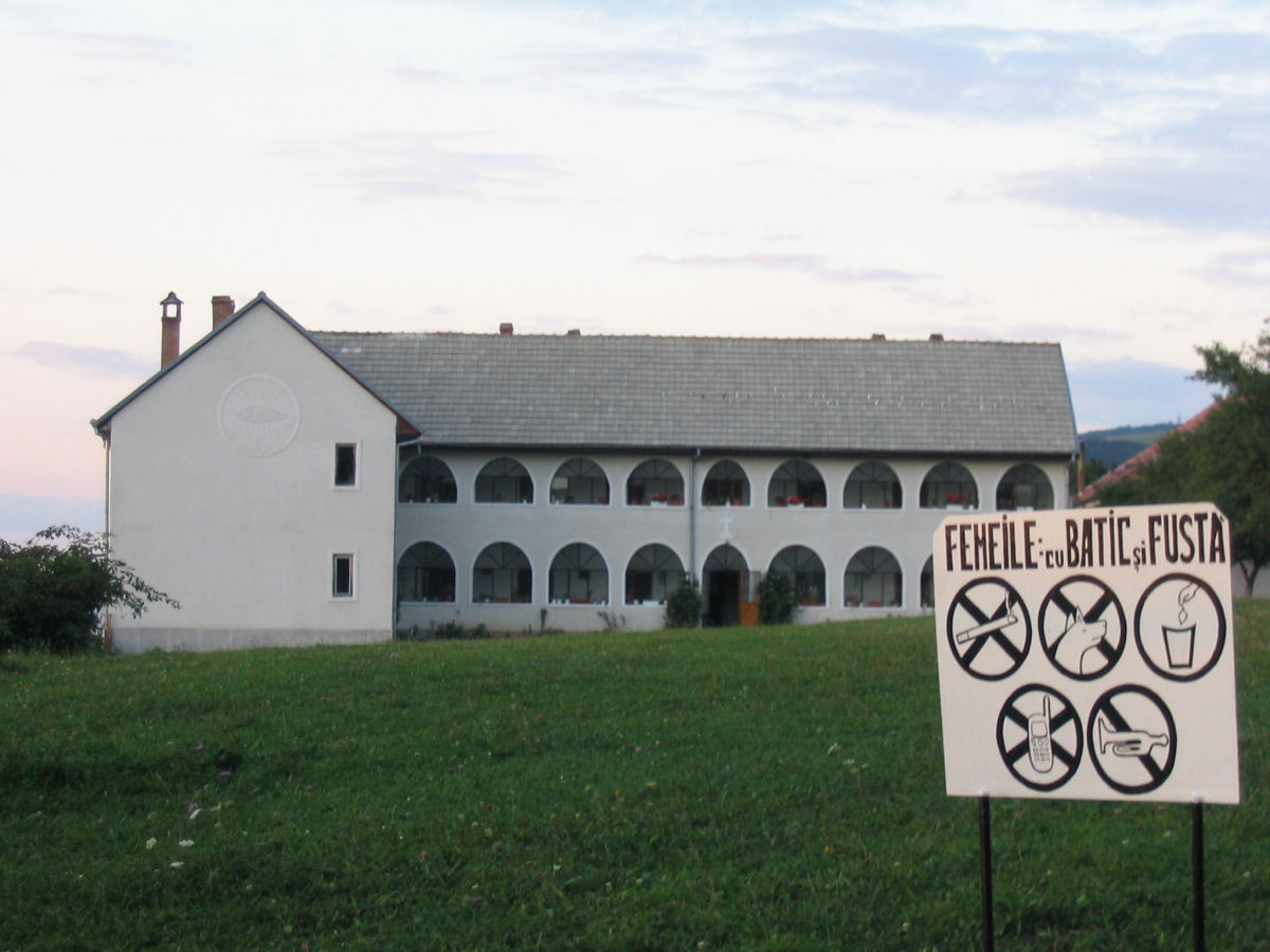 Márkosi ortodox kolostor